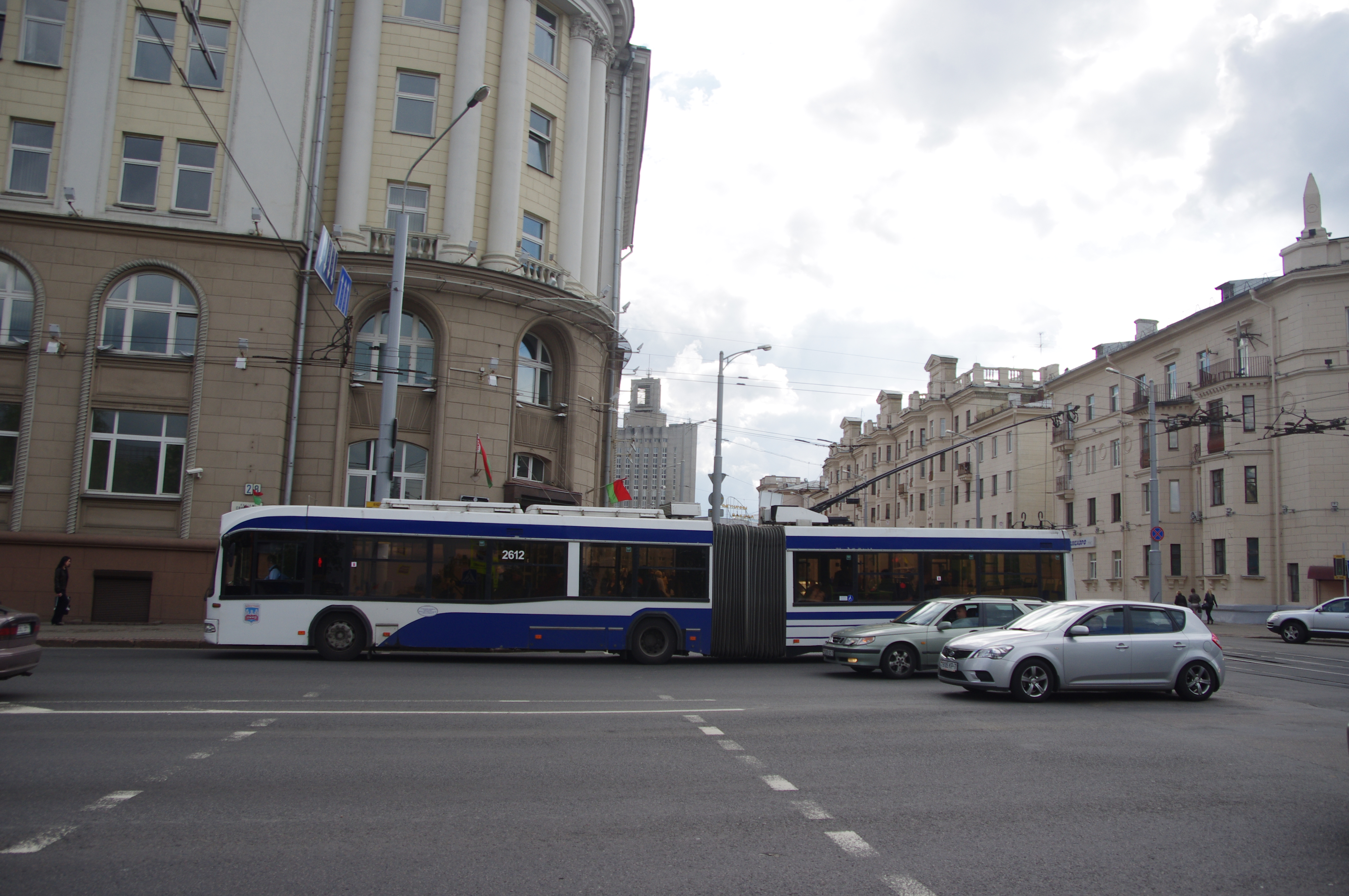 Minsk, Belarus